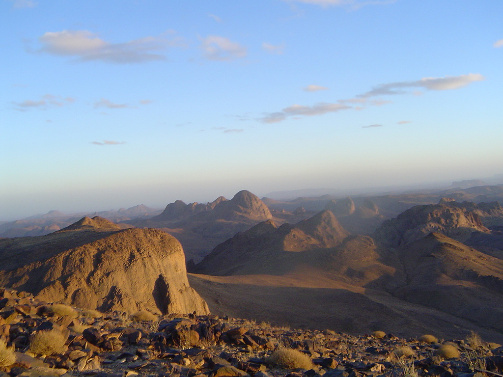 Région de l'Asskrem dans le Hoggar (wilaya de Tamanrasset, sud de l'Algérie).